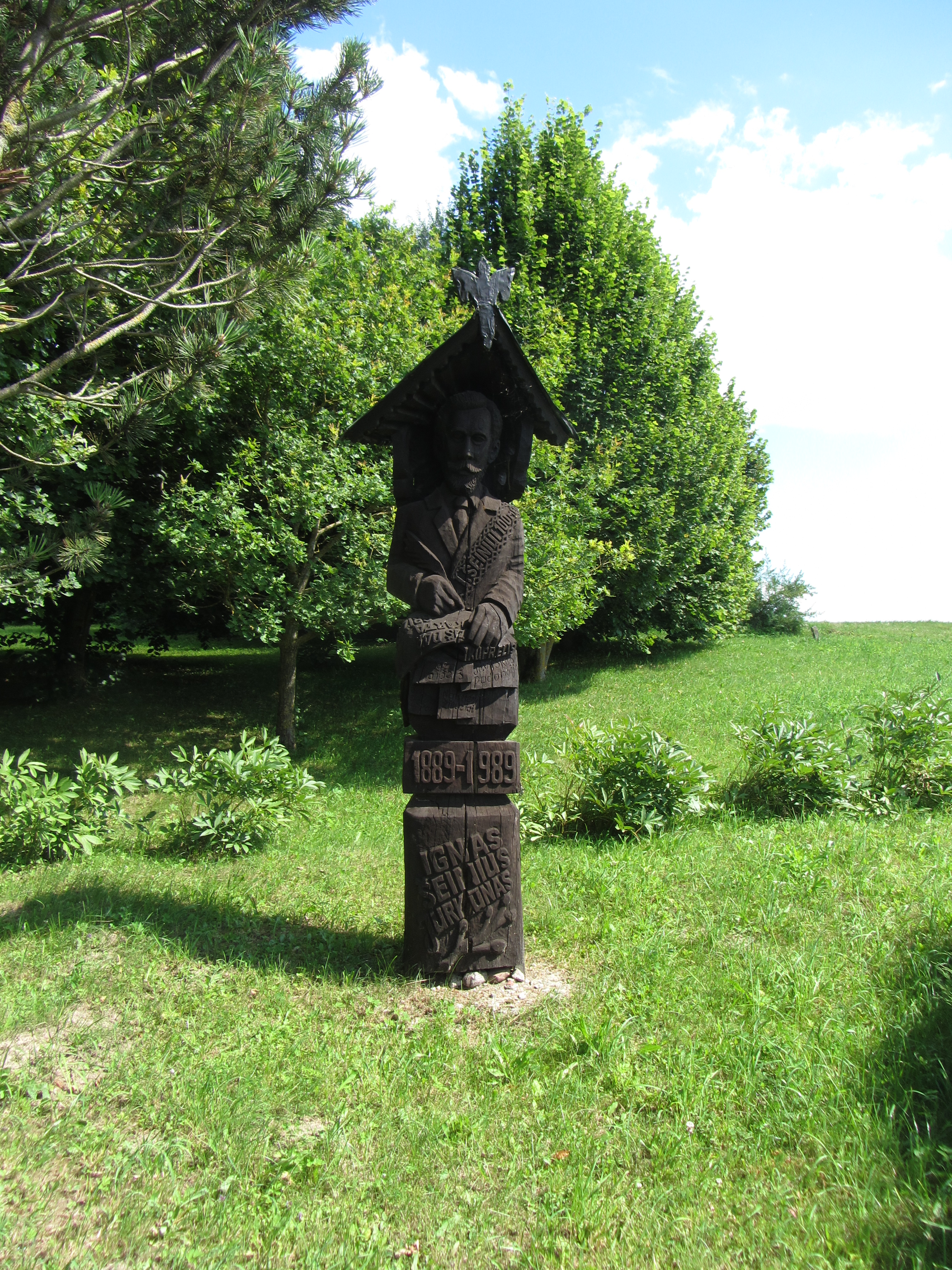 Gelvonų sen., Lithuania